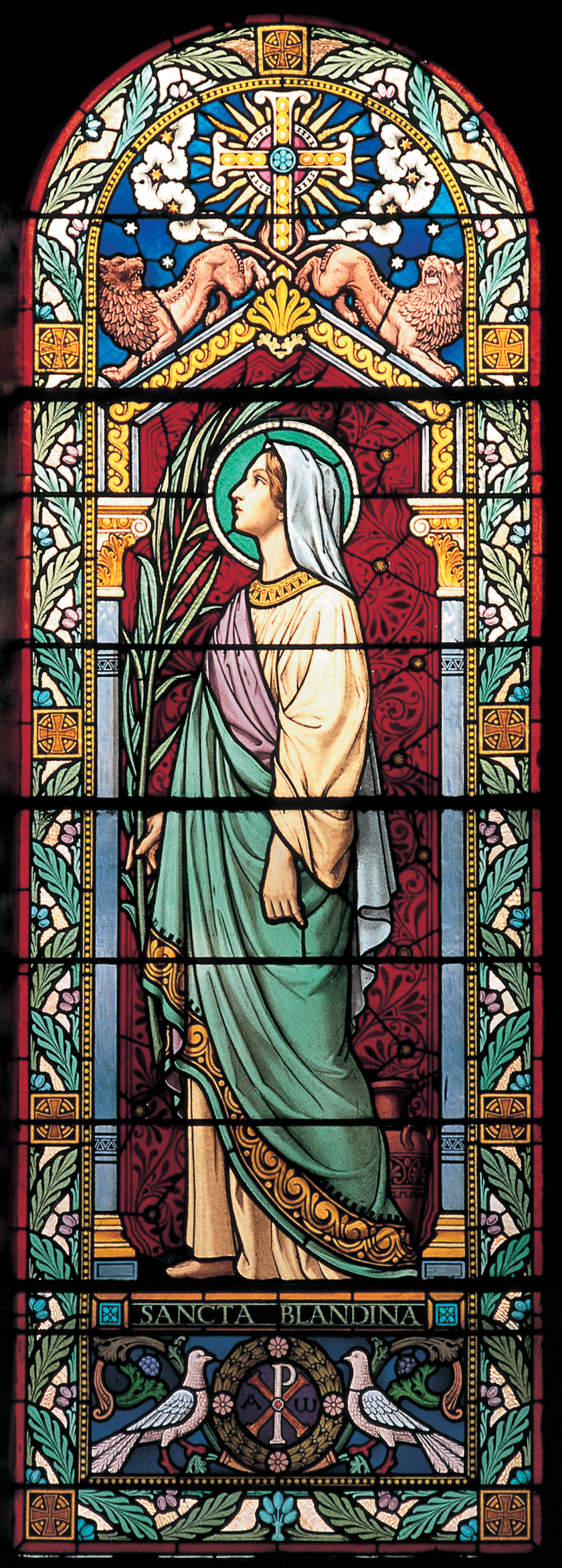 Sainte Blandine ; Vitraux de Lucien Bégule (1901), Église Saint-Irénée.